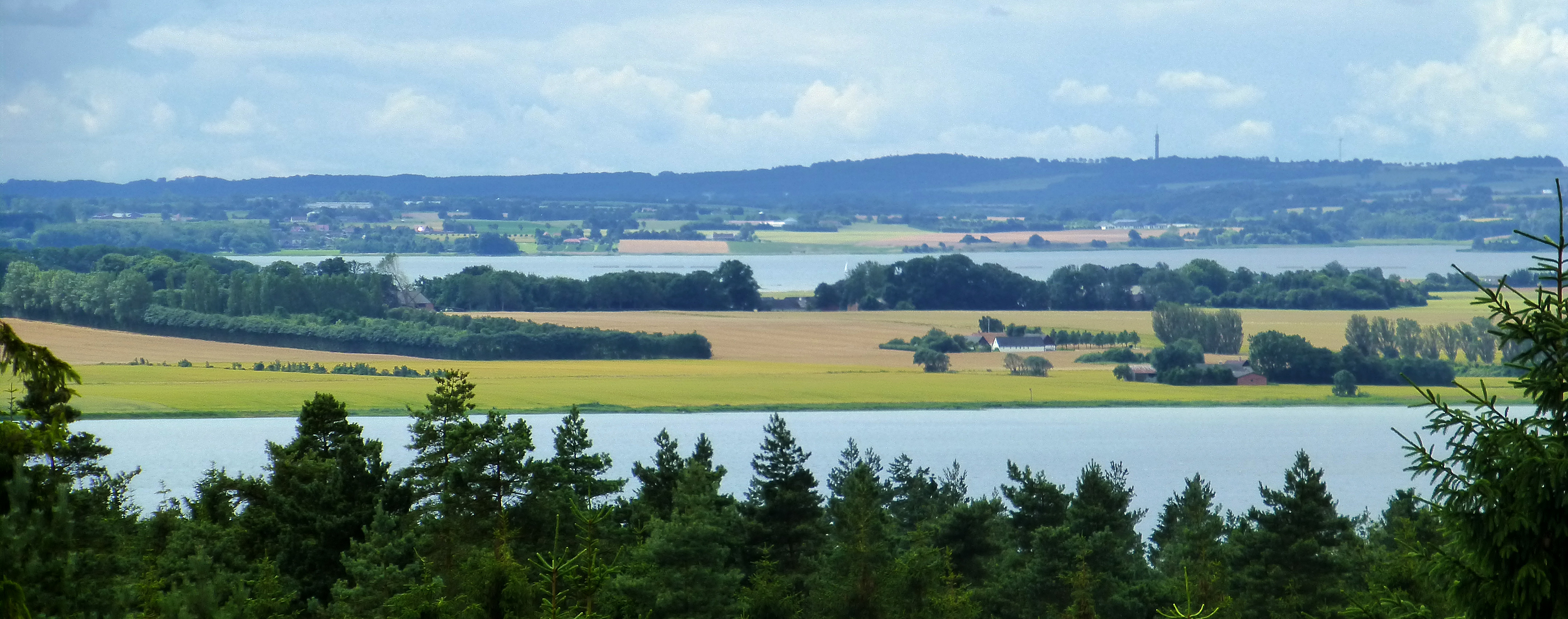 Blakshøj udsigt mod syd over Alrø